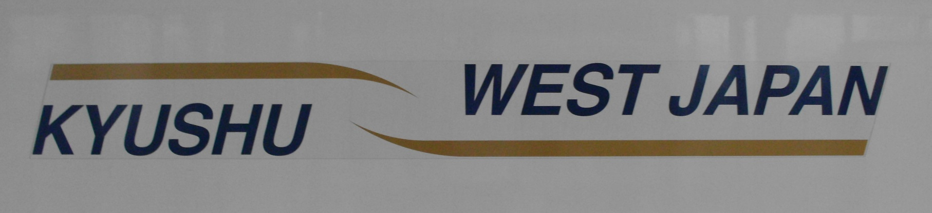 N700系S17編成ロゴ